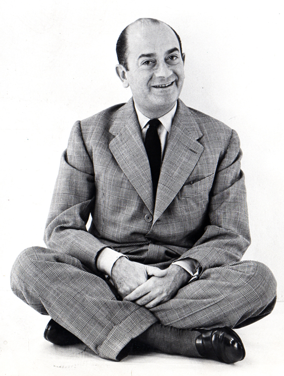 Portrait de couturier Jean Dessès